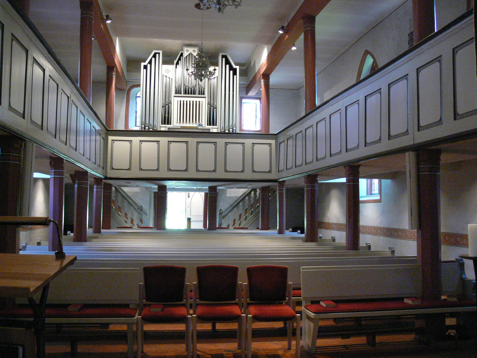 Das Kirchenschiff der ev. Kirche Fronhausen